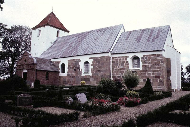 Dølby Kirke, Skive Kommune